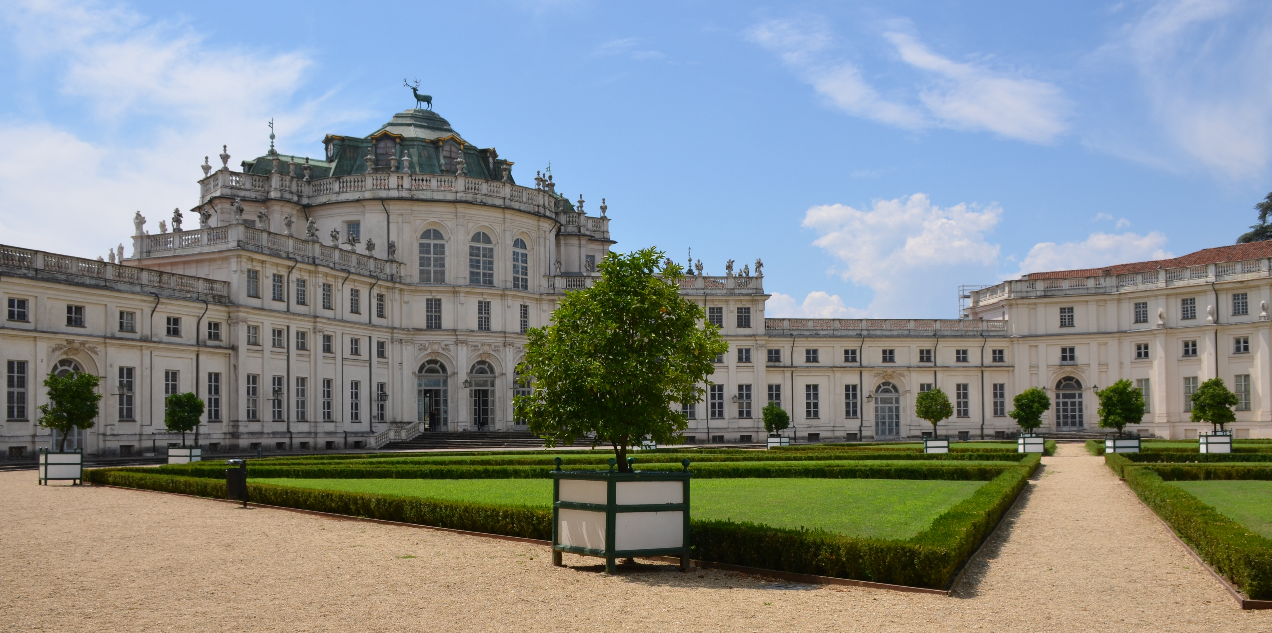 Palazzina di Caccia di Stupinigi.